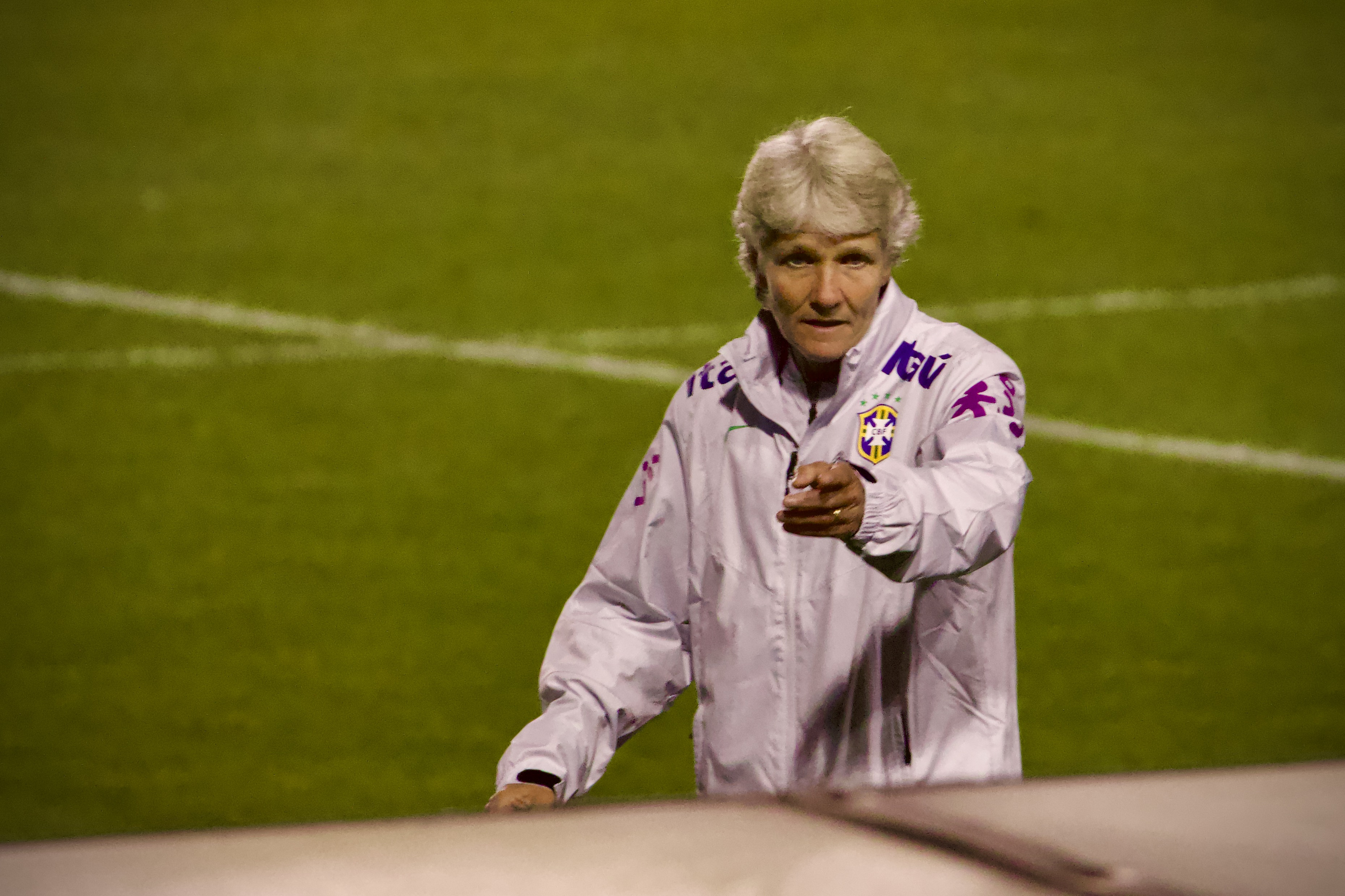 Tournoi Uber Sao Paolo 2019